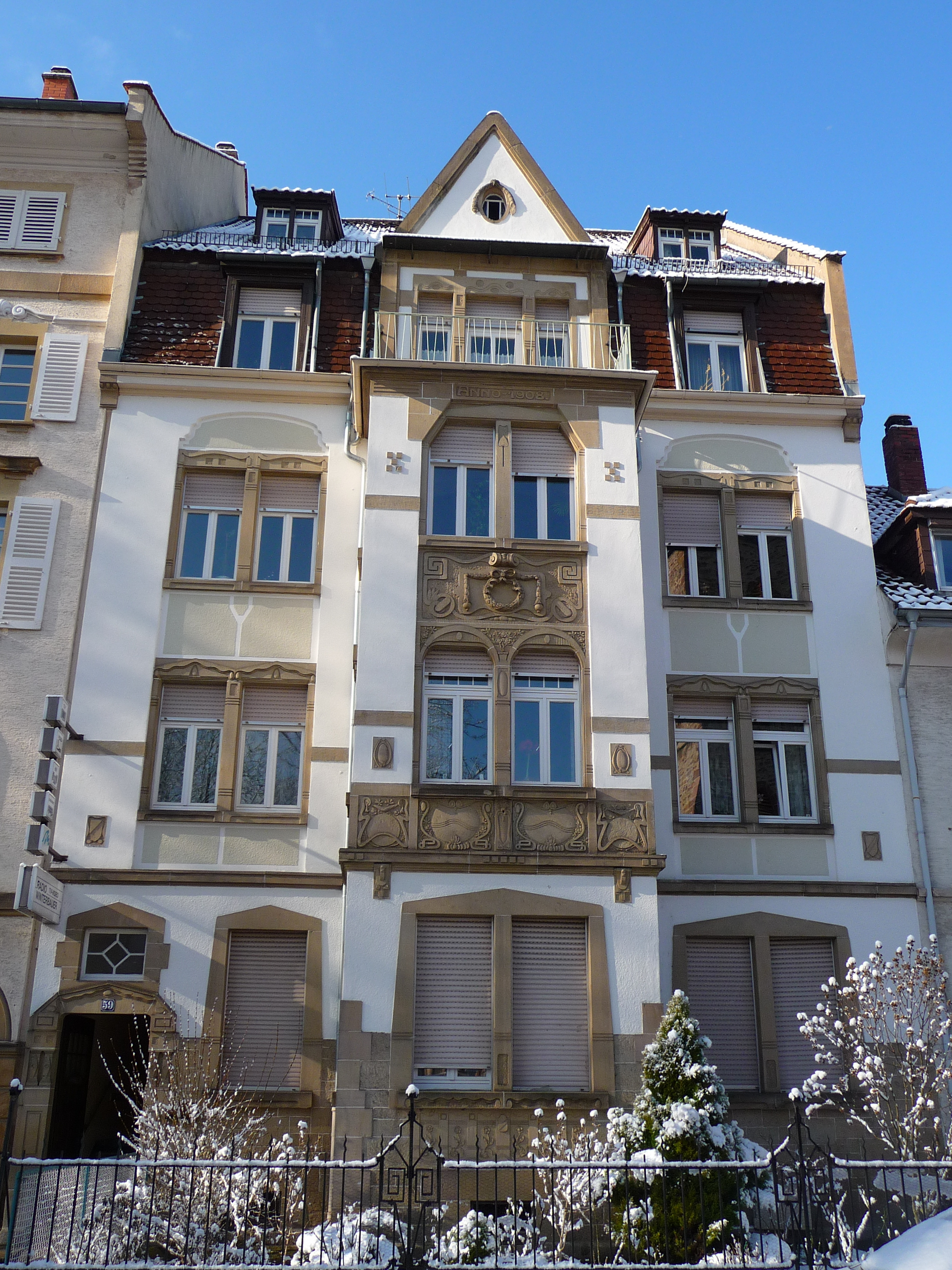 Wohnhaus, erbaut 1908 im Heidelberger Stadtteil Handschuhsheim (Deutschland)